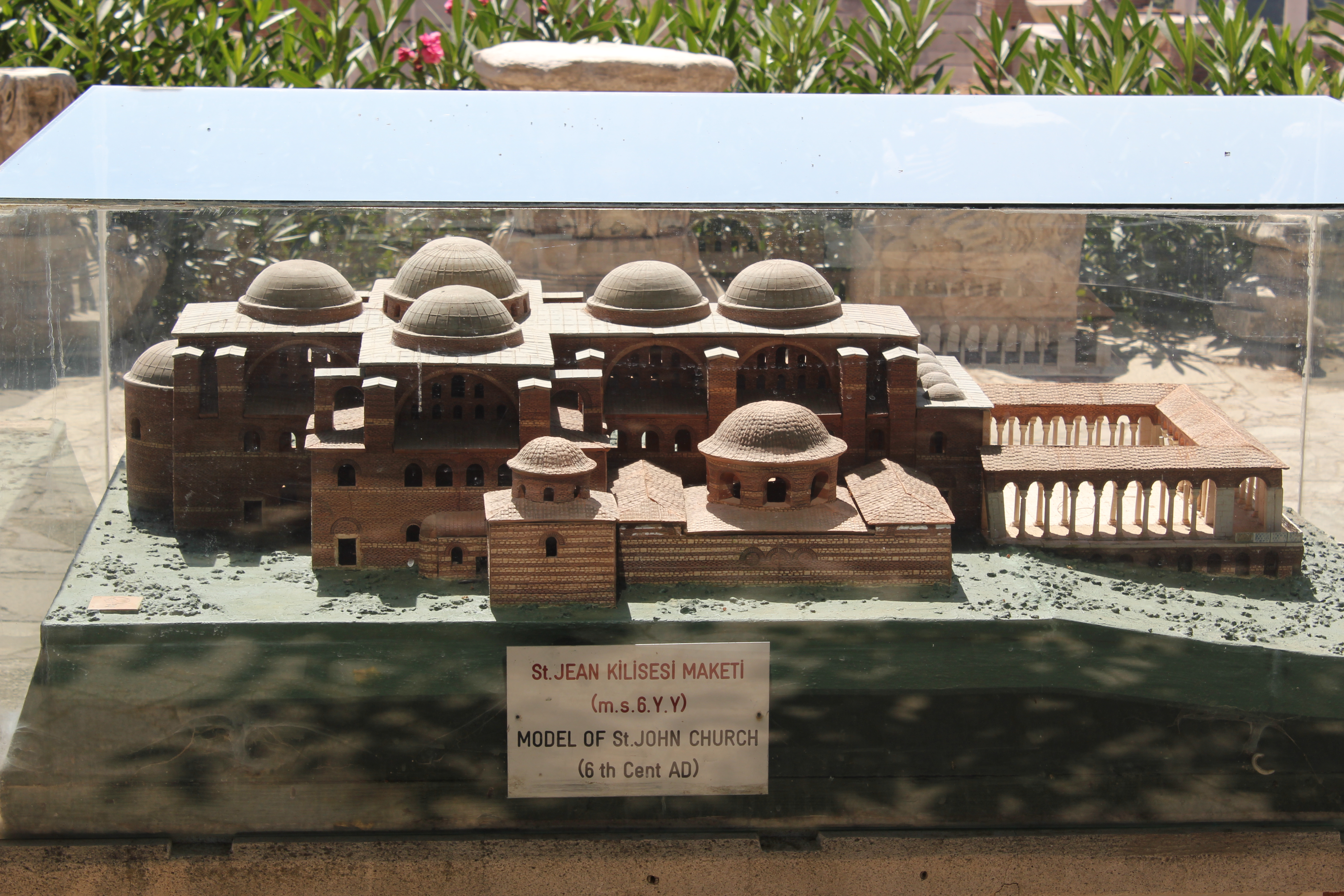 Modell der Johanneskirche in Selçuk, Westtürkei